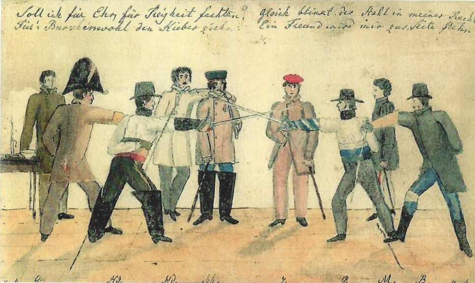 Mensur zwischen Helvetia und Teutonia in Tübingen. Der Unparteiische mit der roten Mütze ist ein Angehöriger der Suevia II, einer Vorverbindung der Rhenania.